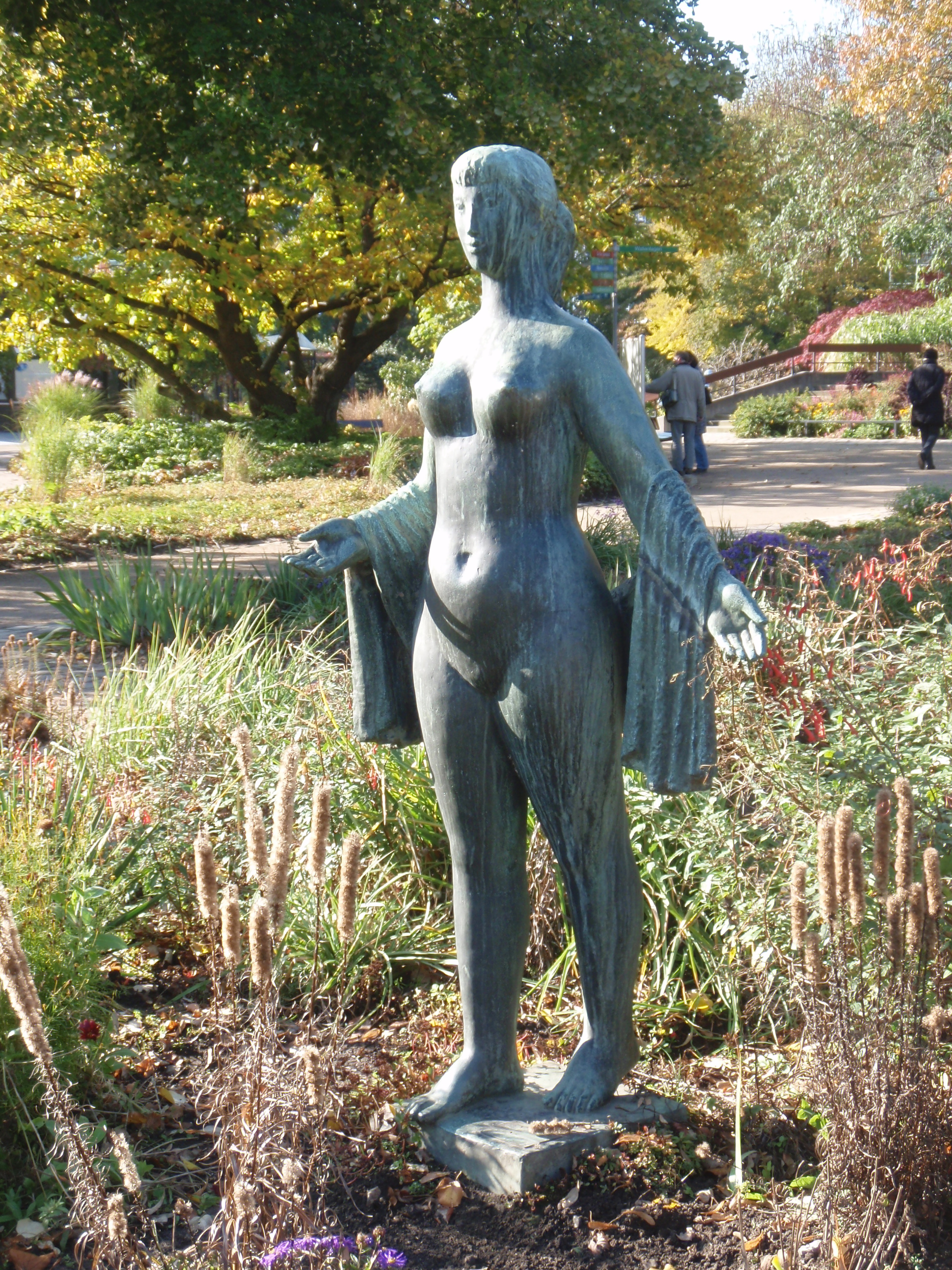 Ursula Querner, Bronzeplastik Aurora, 1953 aufgestellt anlässlich der IGA 1953 in Planten und Blomen beim Kräutergarten